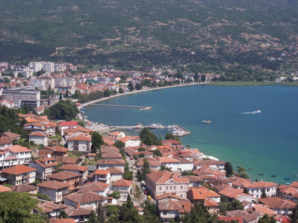 Ohrid, Macedonia